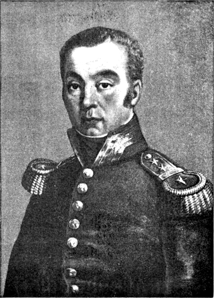 Jacques Fromentin (1754-1830), French General